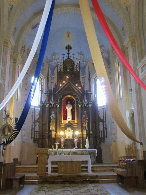 Нача. Касцёл Унебаўзяцця Найсвяцейшай Дзевы Марыі